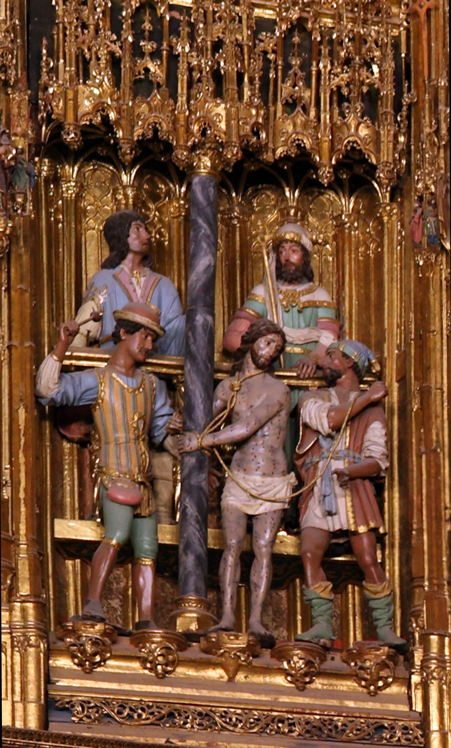 Flagelación de Cristo en la columna, detalle del retablo mayor de la catedral de Toledo (España)